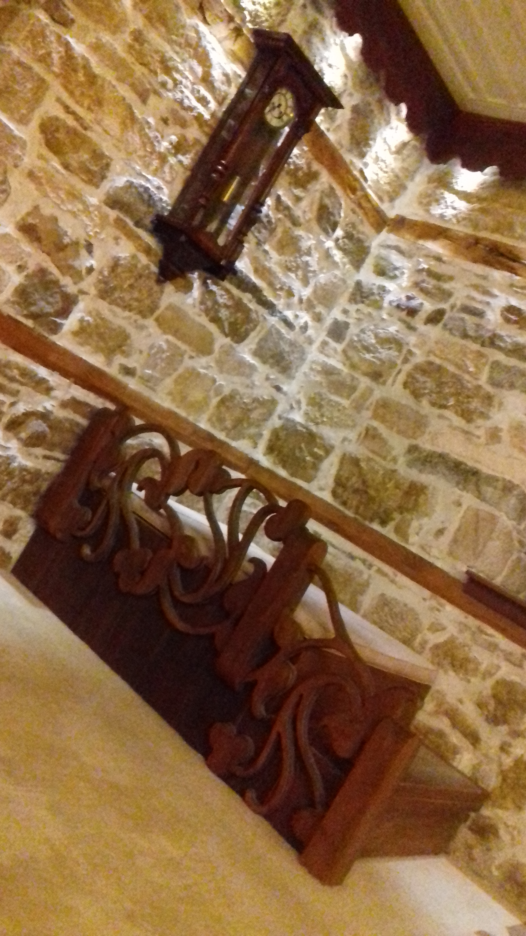 Чаршијска џамија, ? и сат